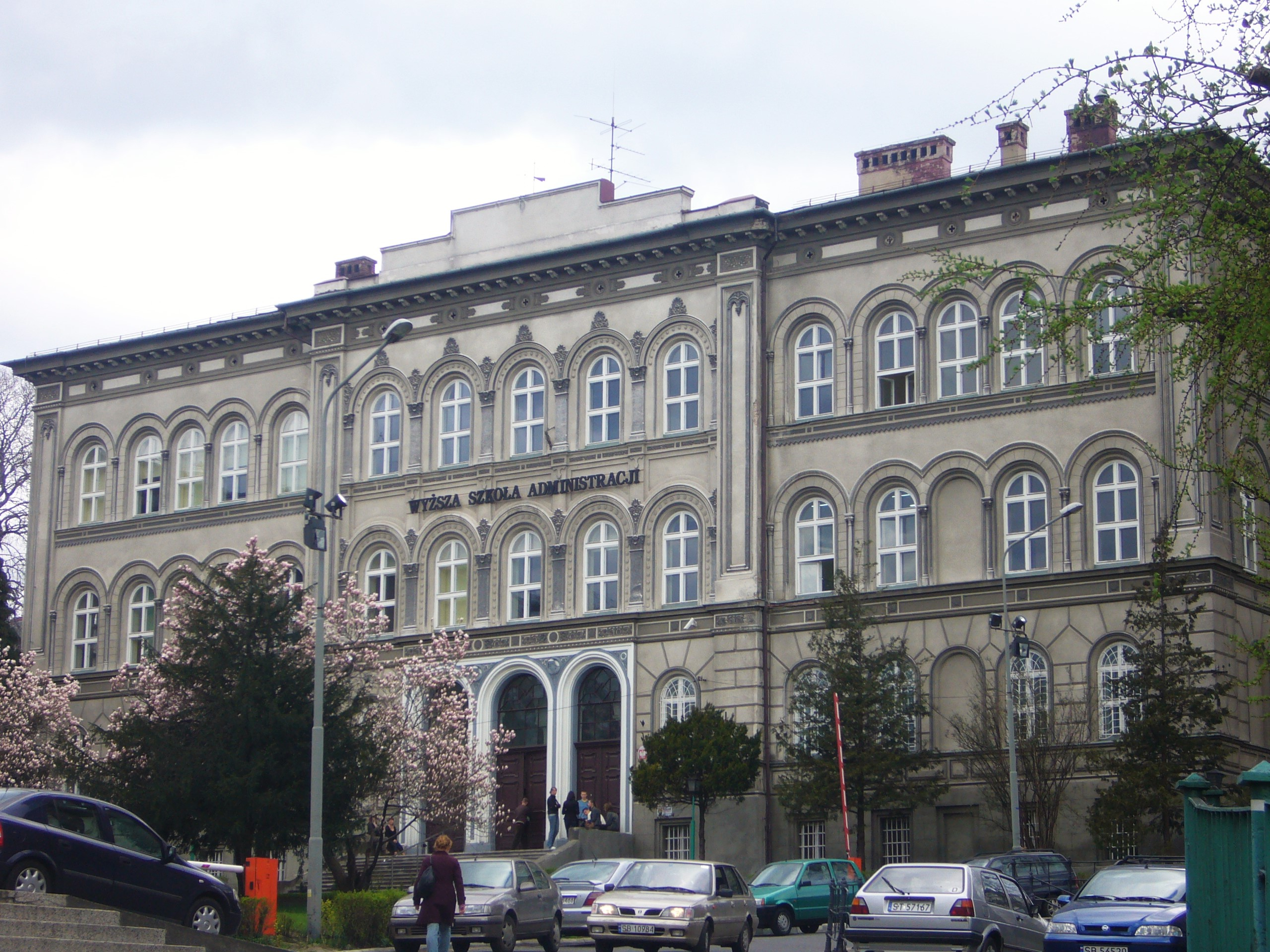 Wyższa Szkoła Adminisracji w Bielsku-Białej